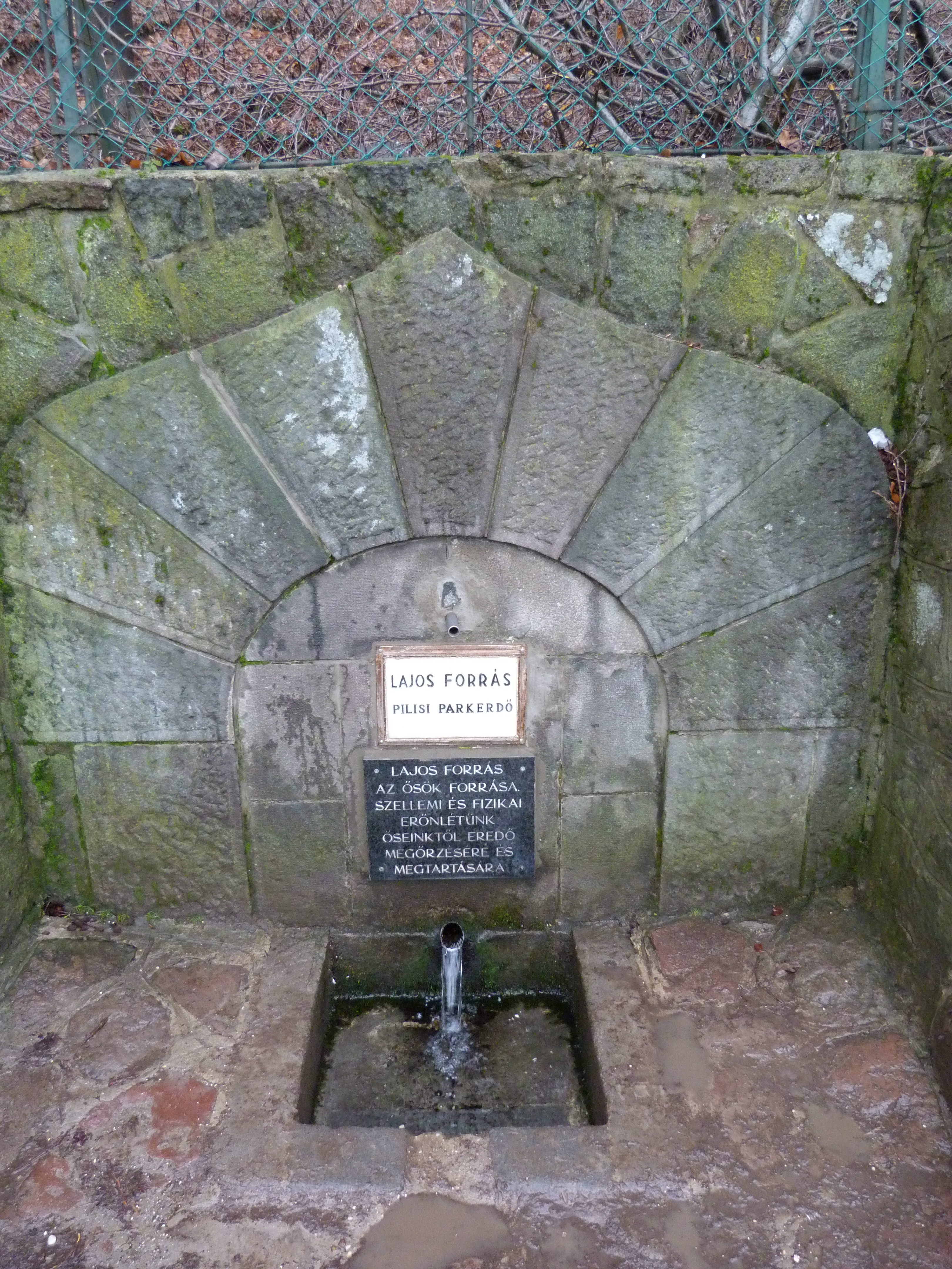 A felvétel 2014. január 5-én vasárnap készült Szentendrén (Izbég). A Lajos-forrás az 587 m magas Bölcső-hegy oldalában fakad. A forrásmedencét 1908-ban építette Gabrinyi Sámuel építész. Báró Podmaniczky Lajosról nevezték el. A kifolyó víz a Jóvízű-patakot táplálja. Megjelent Creative Commons alatt a Metapolisz DVD sorozatban.